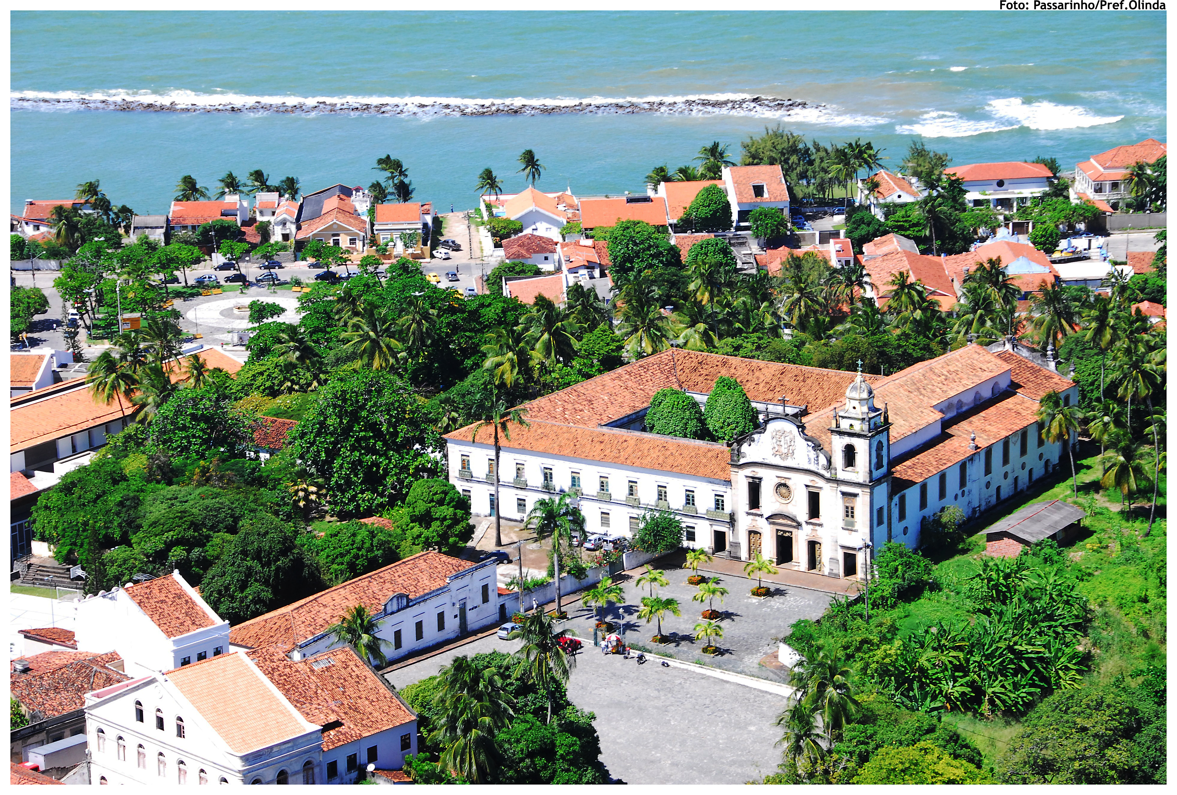 O Mosteiro de São Bento é o segundo construído em terras brasileiras. Sua construção data do século XVI e possui uma característica peculiar que é a de ser São Bento, ao mesmo tempo, padroeiro da Abadia e do Mosteiro. O Mosteiro de São Bento não passou despercebido dos invasores holandeses e foi destruído pelos mesmos em 1631. Por esse e por outros motivos o Mosteiro não possui um estilo arquitetônico definitivo. A fachada da igreja é composta por um brasão e uma torre sineira do século XVIII. Destaca-se também o requintado altar-mor com arquivoltas do barroco brasileiro. Toda em madeira revestida em ouro, no trono principal do altar, encontra-se a imagem do patriarca São Bento. A sacristia conventual é a mais rica das igrejas de Olinda com elaboradas talhas douradas, espelhos de cristais e painéis, mostrando a vida penitente de São Bento. Suas portas são almofadadas em alto-relevo e emolduradas em pedra. In english: The Church and Monastery of Saint Benedict. In